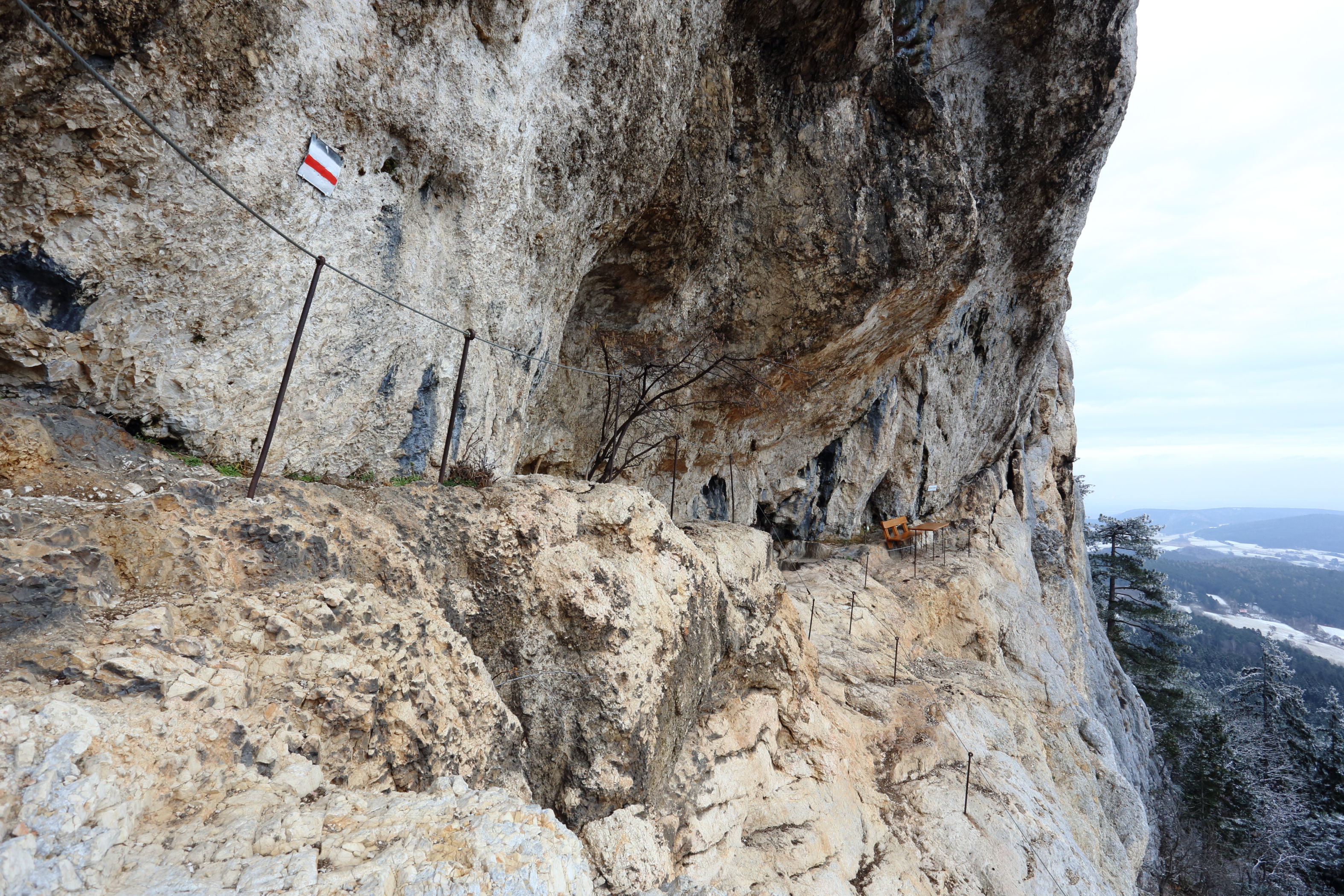 Das sogenannte Karnitschstüberl, ein Teil des Hanselsteiges und wo auch das Steigbuch hinterlegt ist, in der Hohen Wand in Niederösterreich.